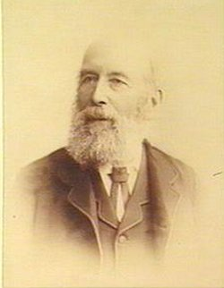 Waterhouse, Frederick George (1815–1898)